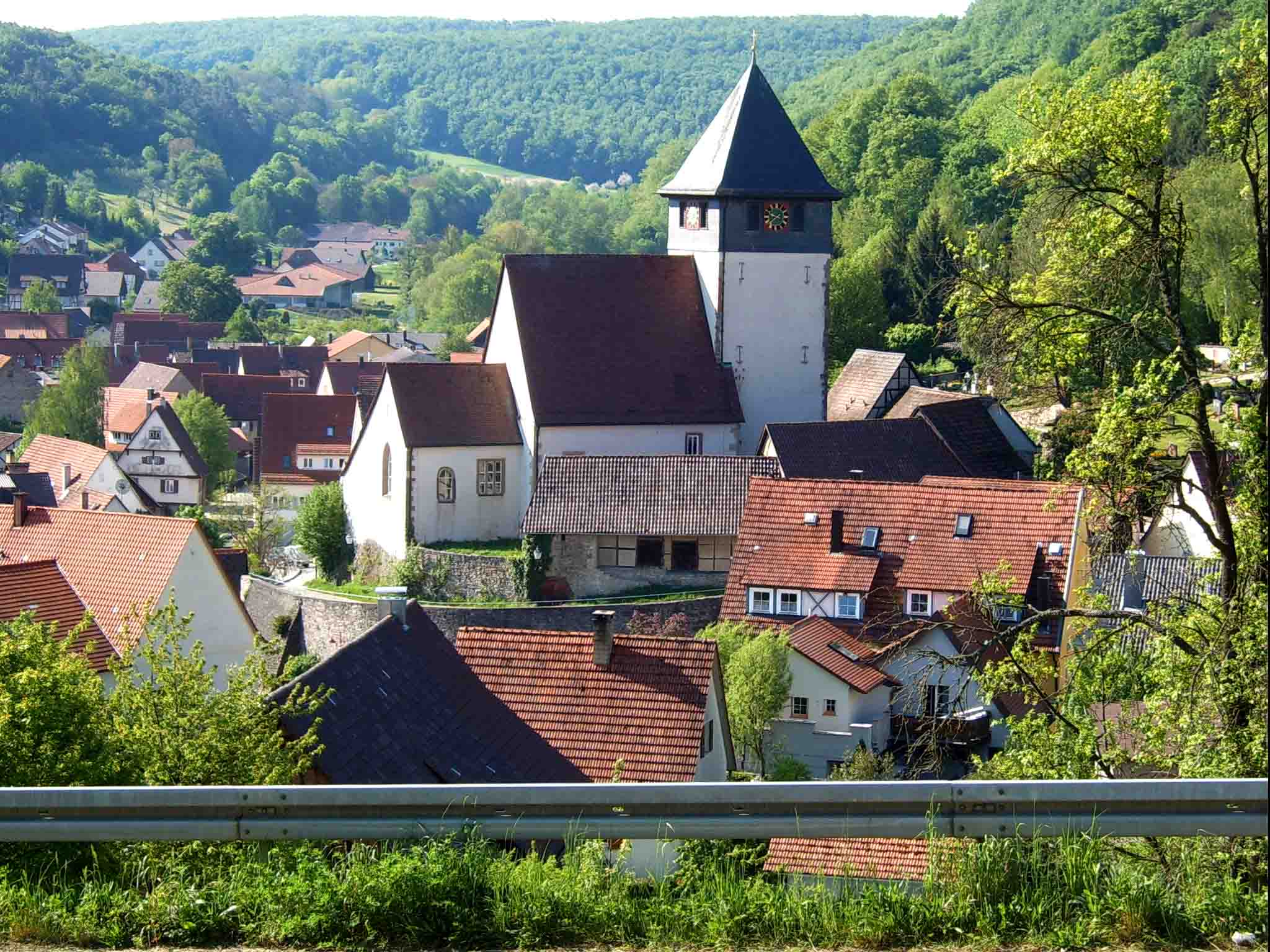 Iptingen (Kirchenburg); Kreis Enz; Bundesland Baden-Württemberg; Deutschland; Erbaut im 12 Jh.; Erneuerung im 15. Jh.; spätere Veränderungen; Bemerkenswert: Feste Kirchhofmauer (ohne Wehrgang) in Teilen erhalten; massiver Kirchturm (Chorturm); Gaden-Kirchenburg; Gaden teilweise rekonstruiert